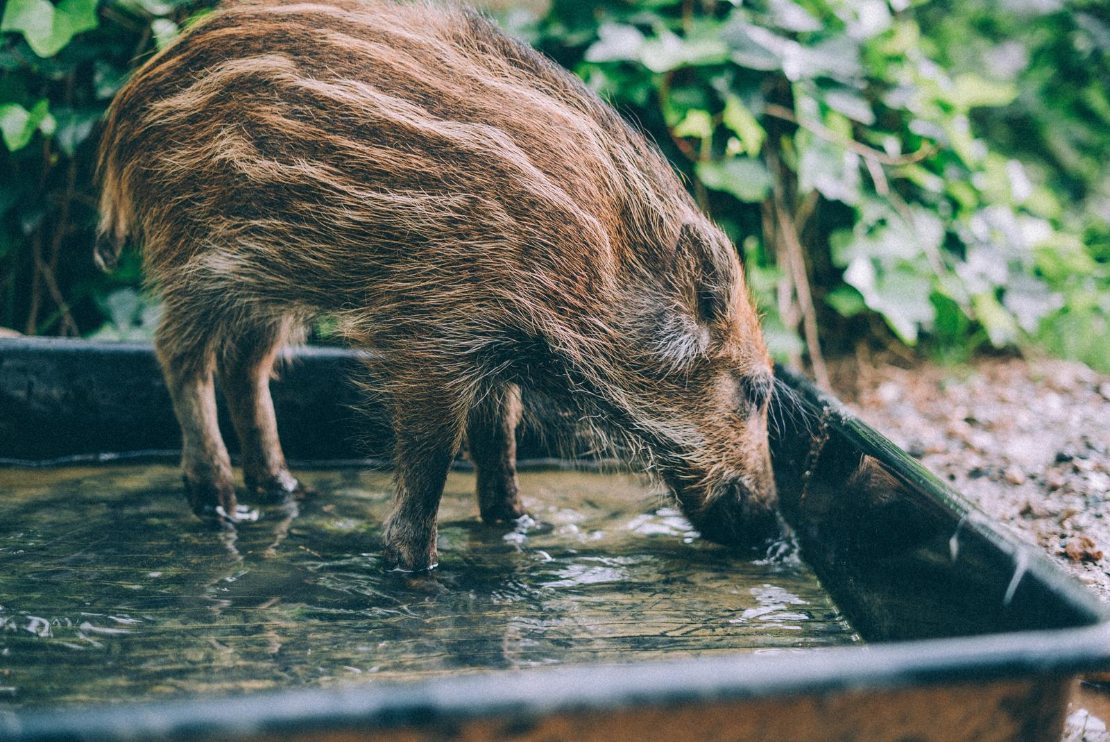 Este jabalí es uno de los ejemplares que podemos encontrar en la Reserva Wild Forest.